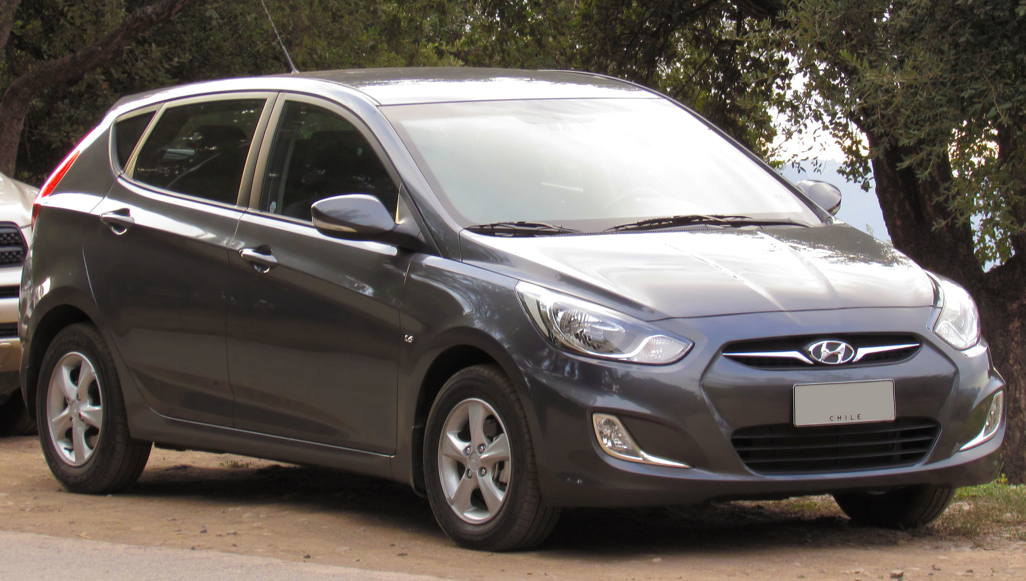 Hyundai Accent GLS 1.6 2013